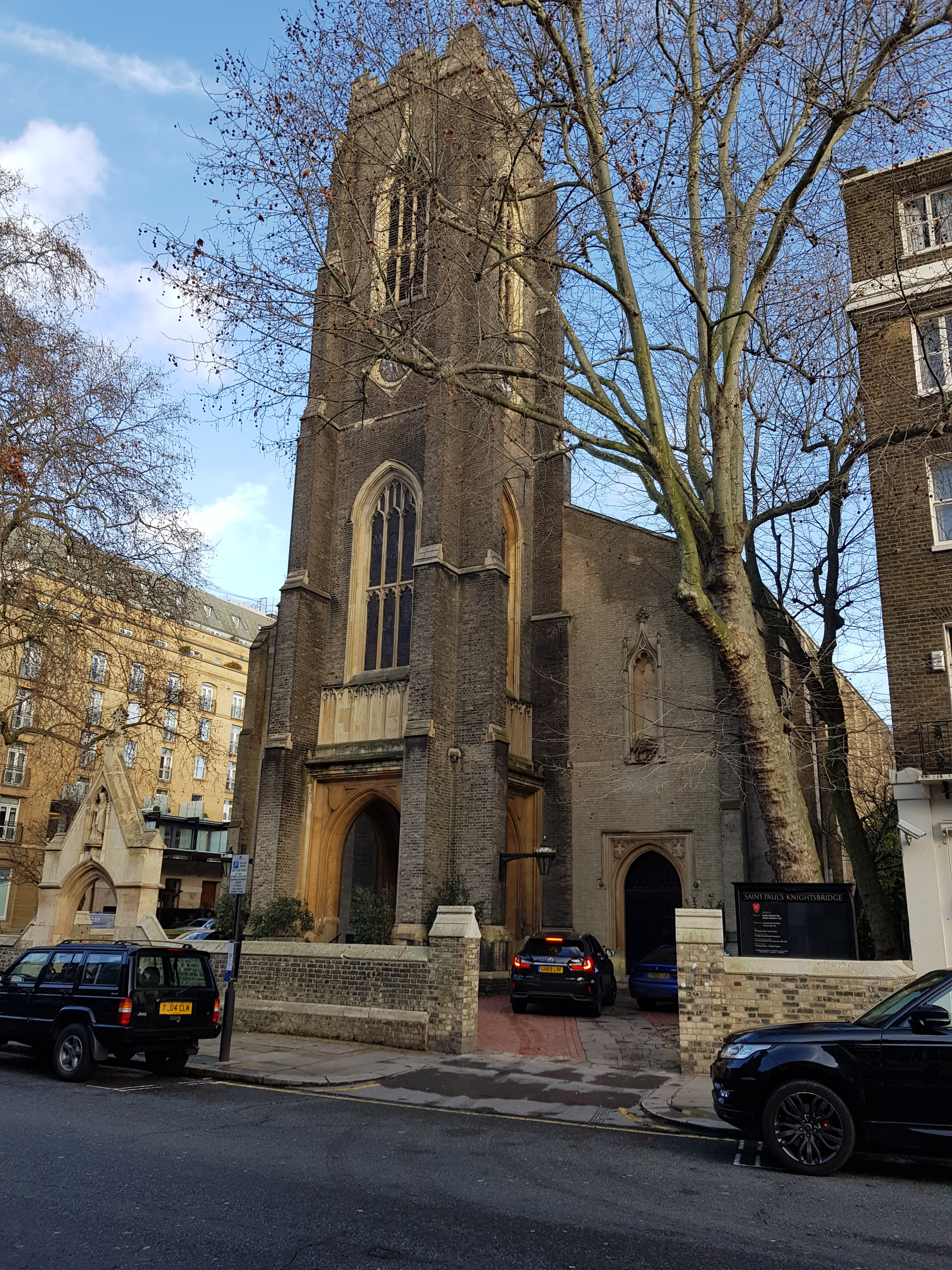 Eglise Saint-Paul, Knightsbridge, Londres.